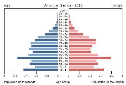 Половозрастная пирамида Американского Самоа 2016